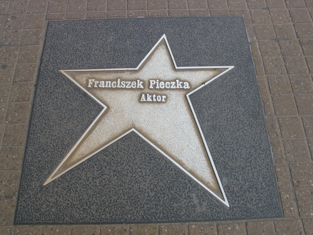 Łódź Walk of Fame - Franciszek Pieczka